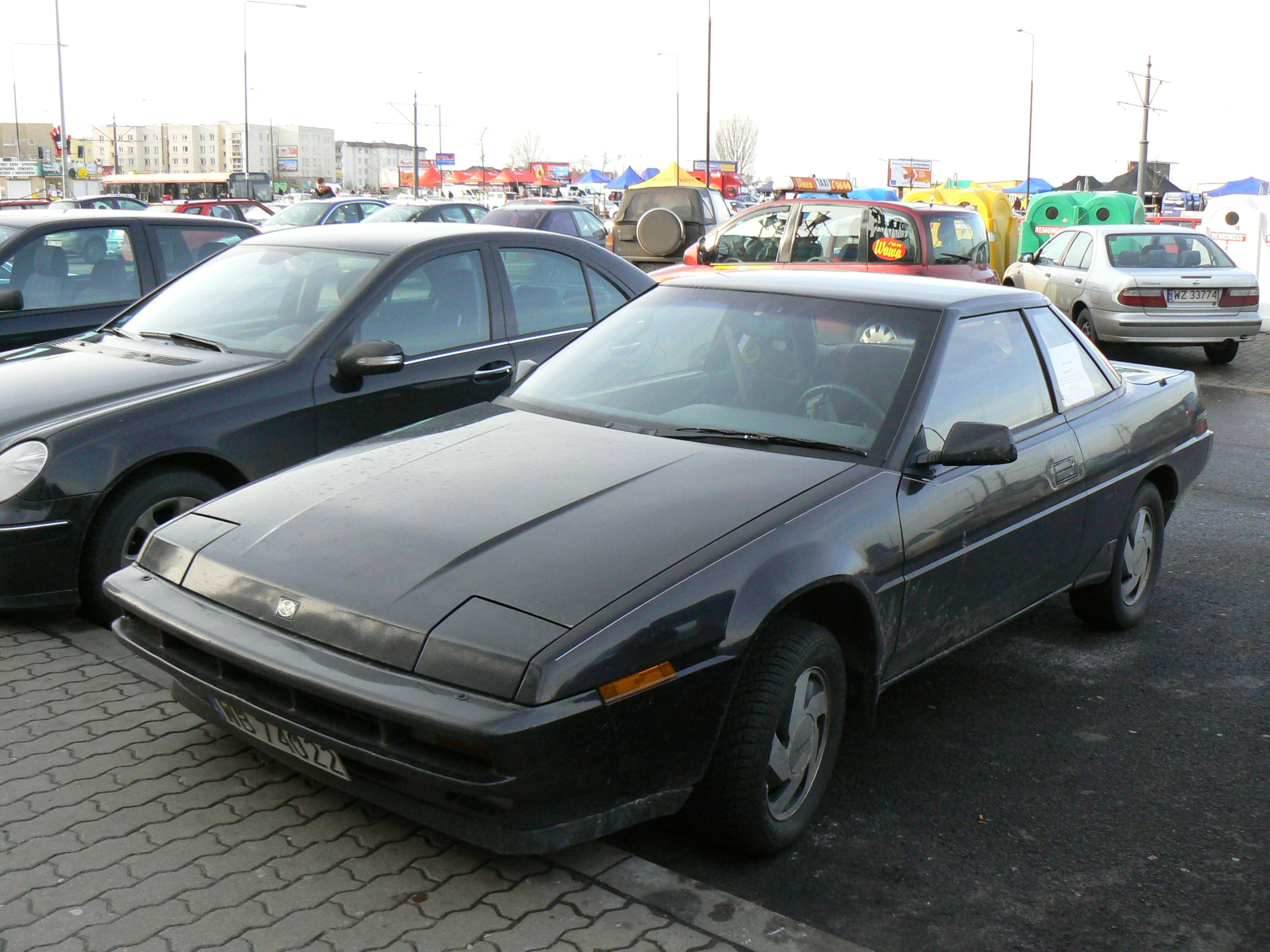 Black Subaru XT6.